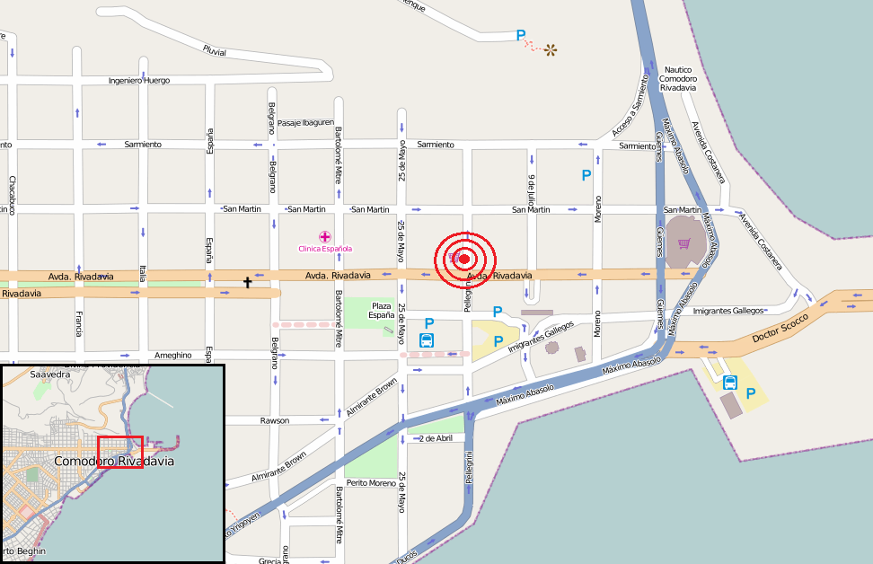 Ubicación de la sucursal de Casa Tía en Comodoro Rivadavia, Chubut, siniestrada el 23 de noviembre de 1999